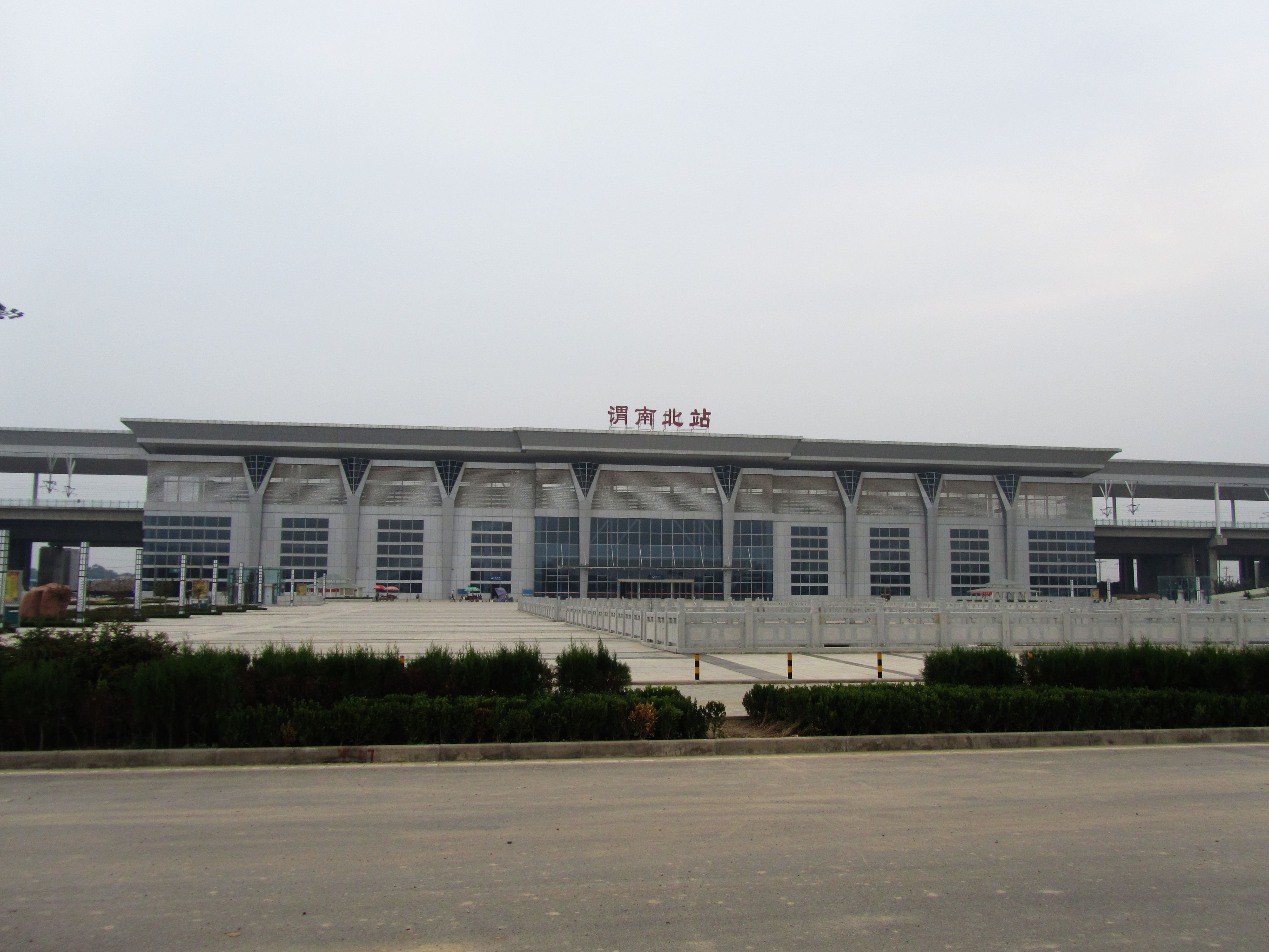 渭南北站远景。